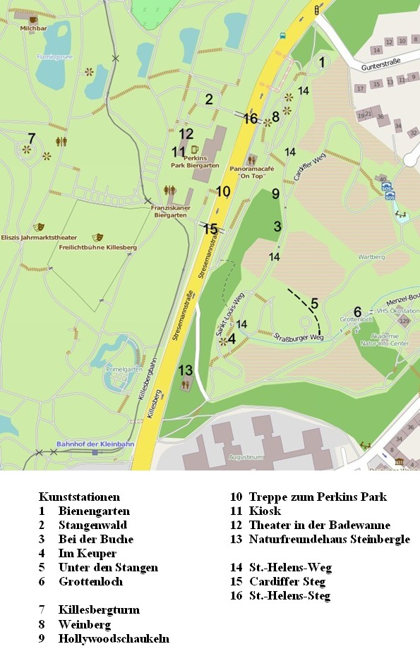 Höhenpark Killesberg / Wartberg, Stuttgart, Lageplan, Ausschnitt (OpenStreetMap ergänzt).